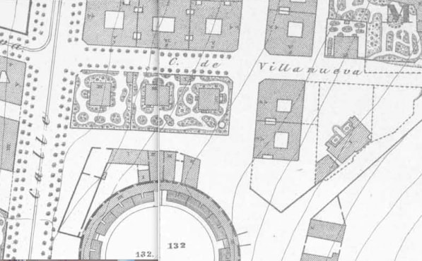 Palacete de la calle Villanueva en el Plano Parcelario de Madrid de 1874, realizado por el Instituto Geográfico y dirigido por Carlos Ibáñez e Ibáñez de Ibero: .